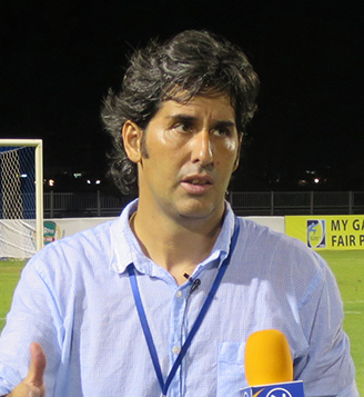 Stefano Cugurra